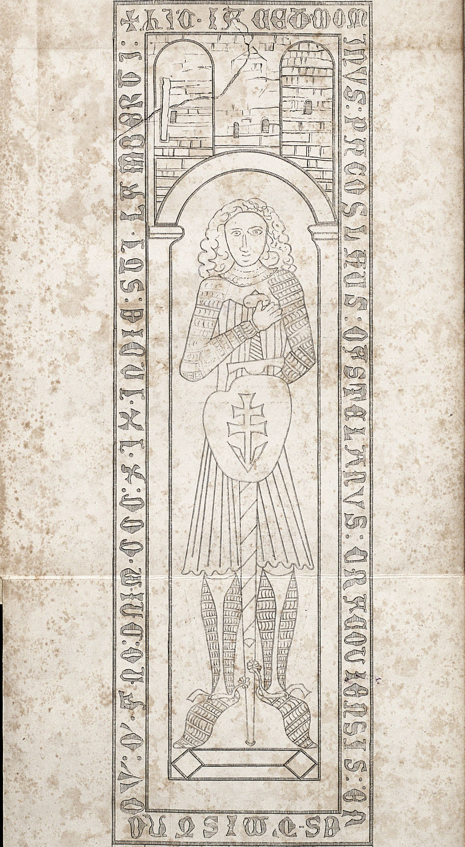 Cistercian Abbey in Jędrzejów Native nameArchiopactwo Cystersów w JędrzejowieLocationJędrzejówCoordinates50° 39′ 13″ N, 20° 17′ 04″ E Established1140Authority control : Q1775407 Płyta nagrobna Pakosława z Mstyczowa